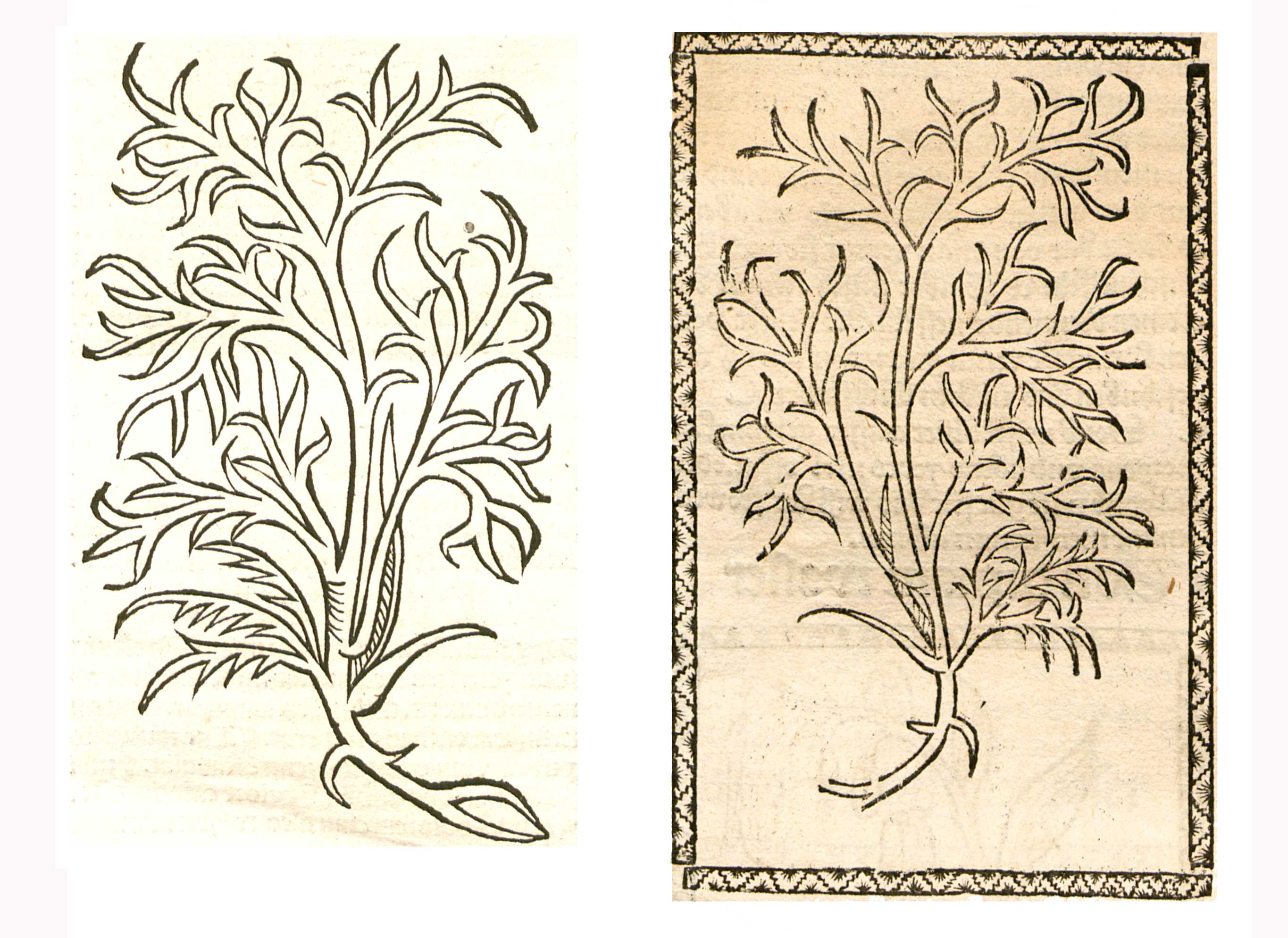 Abbildung von Dillen (Anethum graveolens)